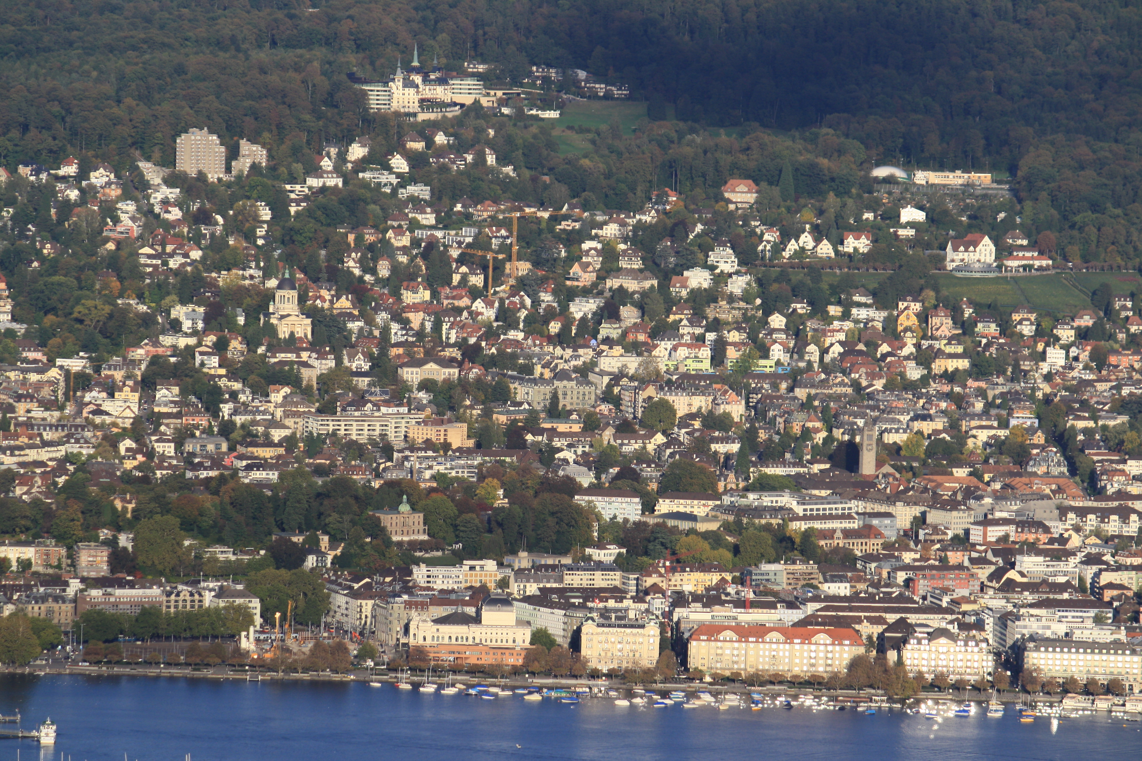 Adlisberg and Zürich-Hottingen, as seen from Uetliberg Aussichtsturm, Seefeld quarter in the foreground, Grand Hotel Dolder in the background.